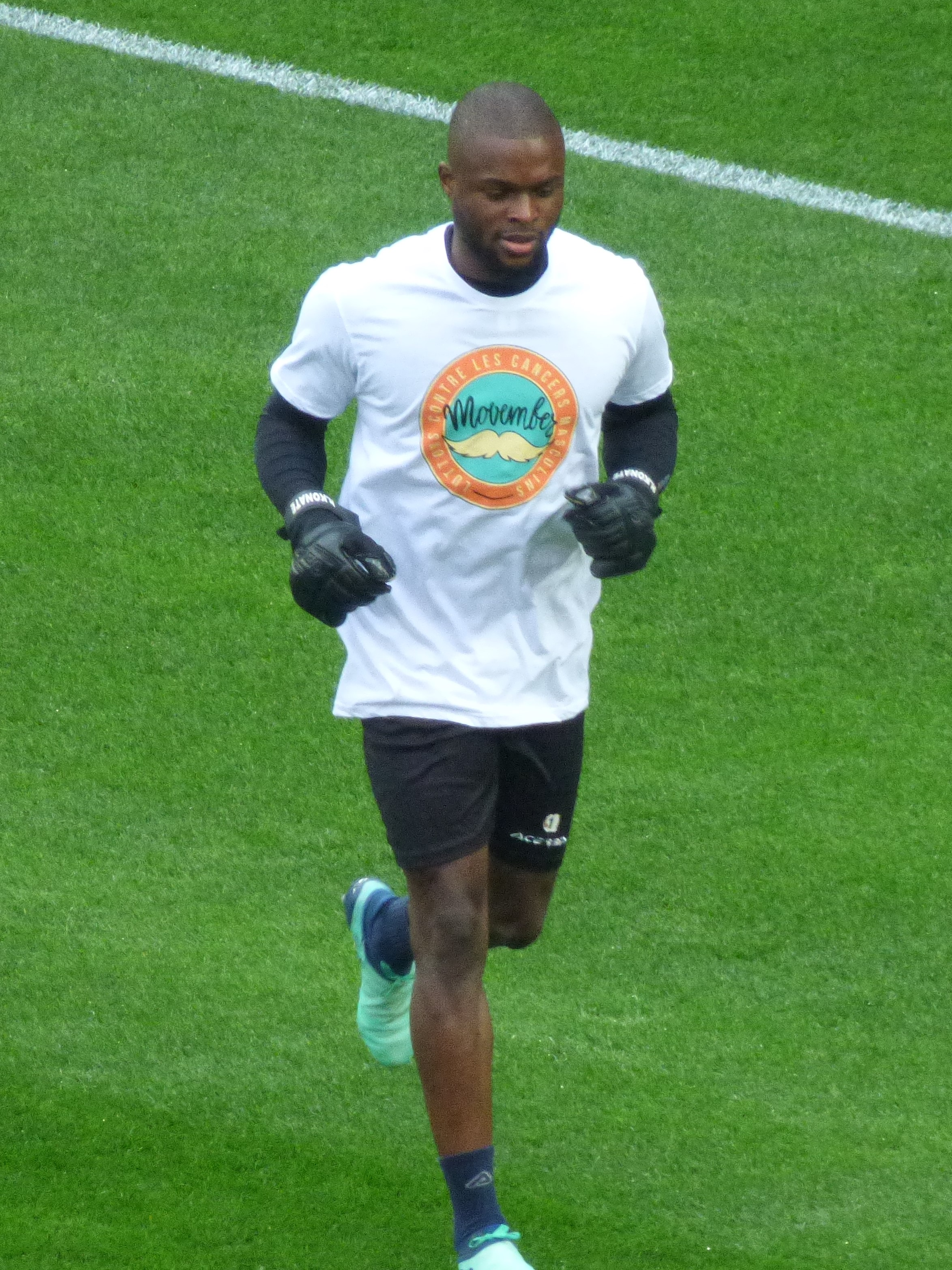 Hillel Konaté avant le match Valenciennes FC / RC Lens, comptant pour la quatorzième journée du championnat de France de Ligue 2 2018-2019, le 10 novembre 2018, au Stade du Hainaut.